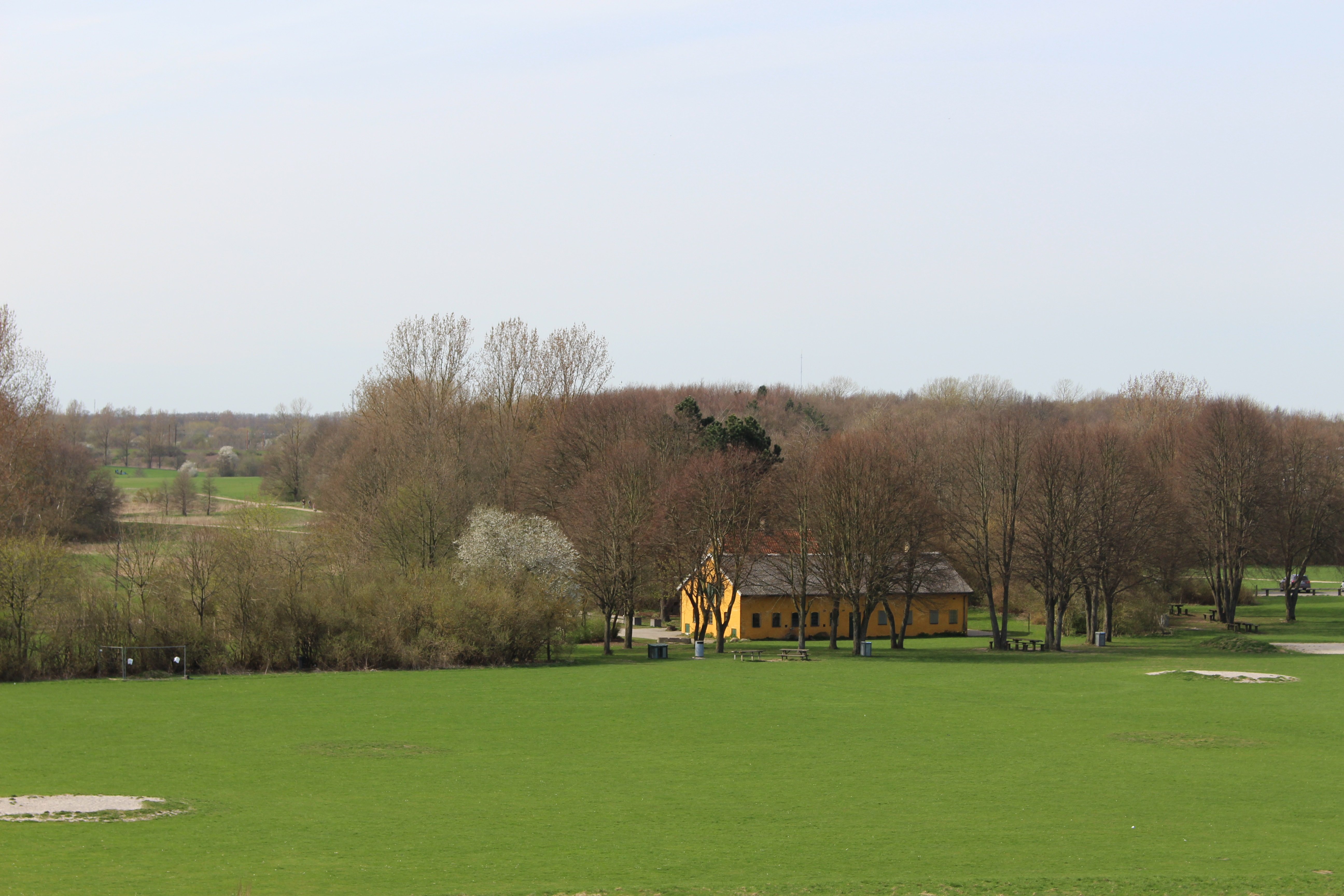 Kongsholmparken mod vest